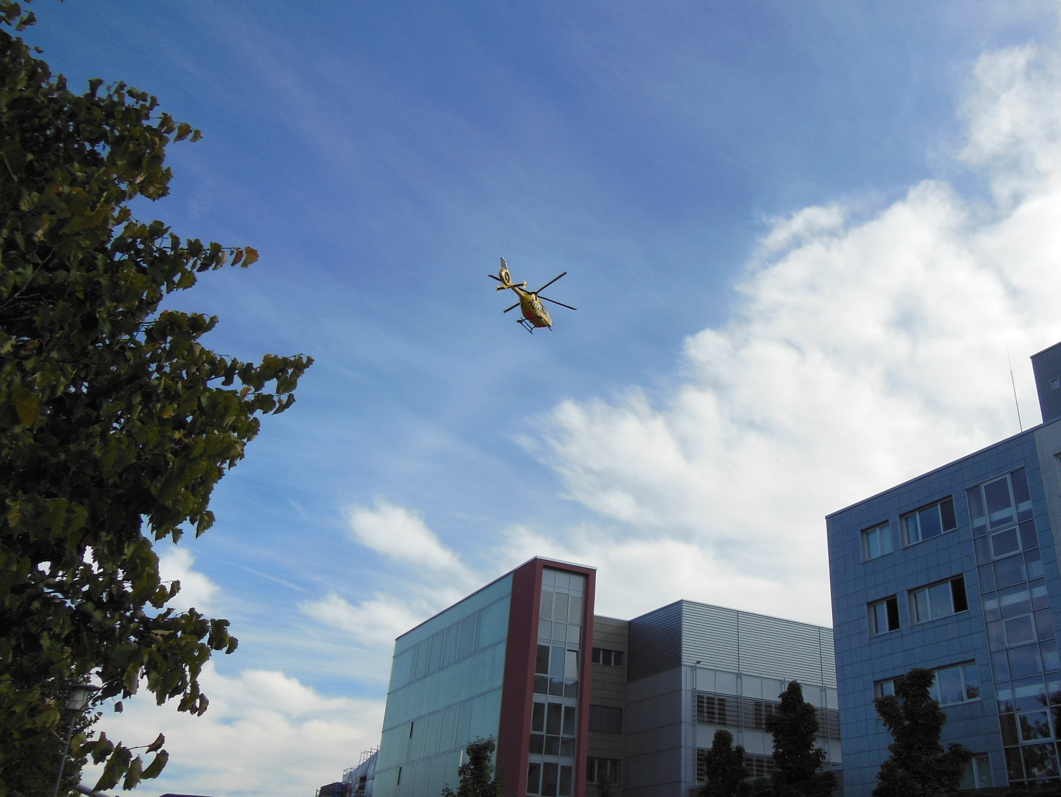 Rettungshubschrauber des ADAC im Anflug auf das Carl-Thiem-Klinikum Cottbus